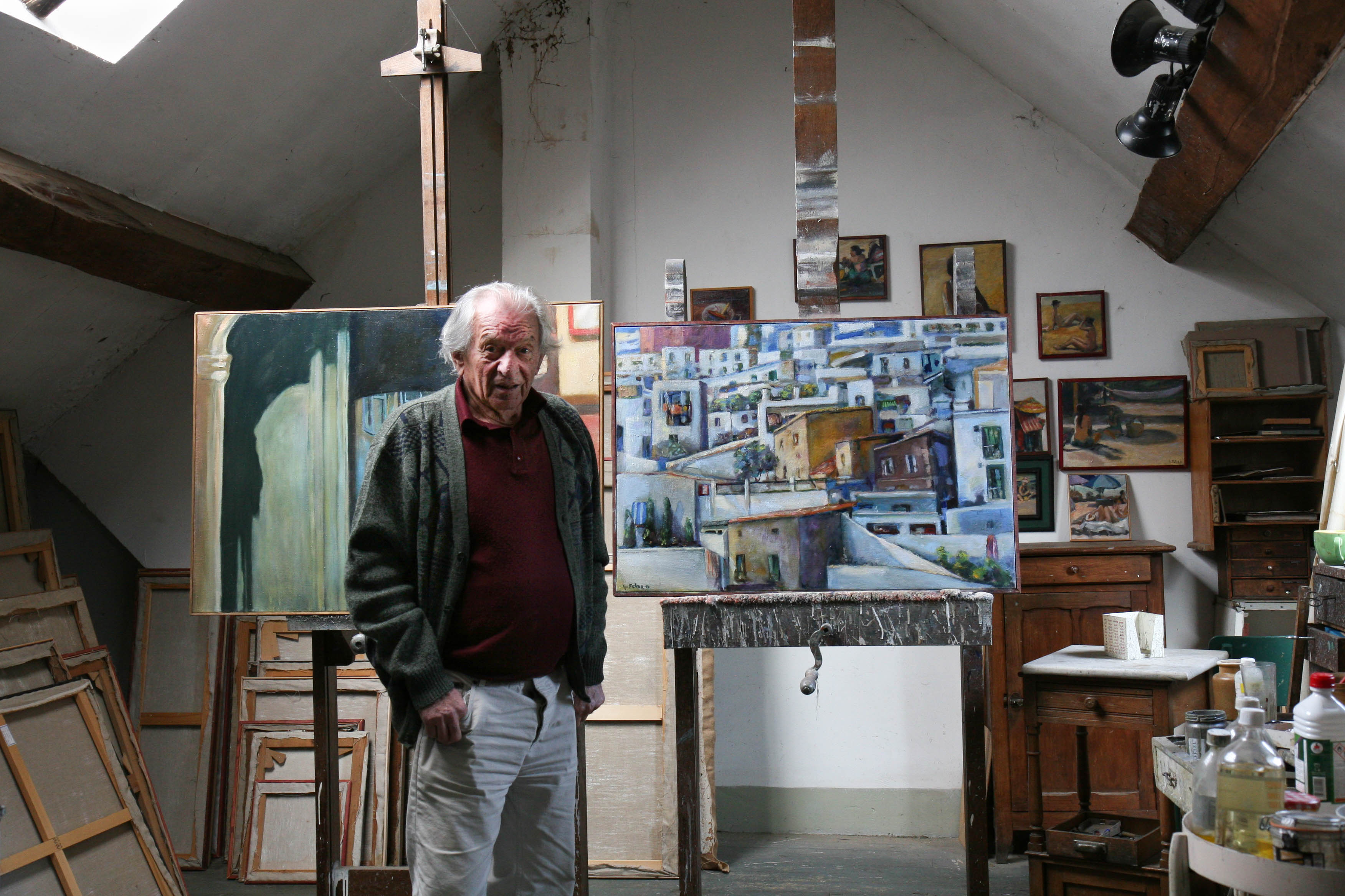 portrait devant tableau